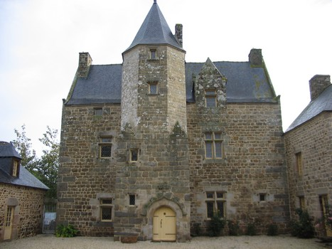 Manoir de Fournebello, à Plouagat. Un élégant petit manoir breton du XVIe siècle.